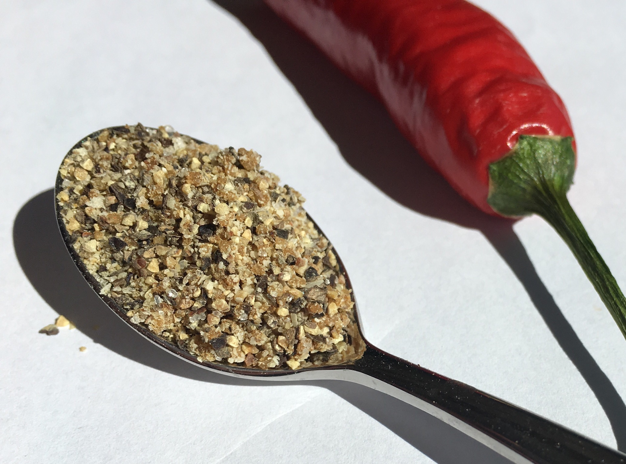 Teelusikallinen sitruunapippuria